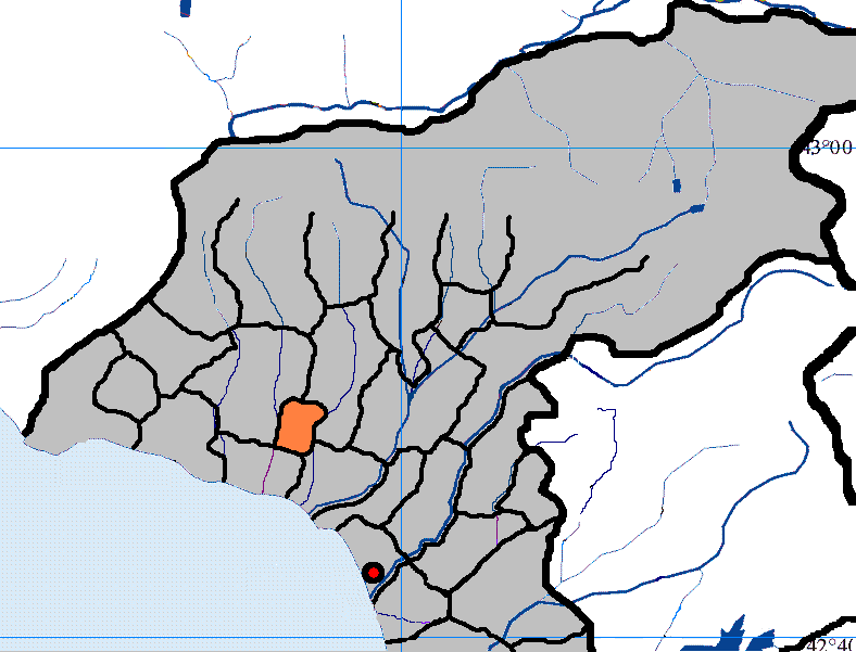 село Лабра в Очамчирском районе